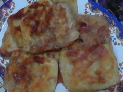 نوع من الخبز الجزائري محشي بالصلصة This is an image of food from Algeria